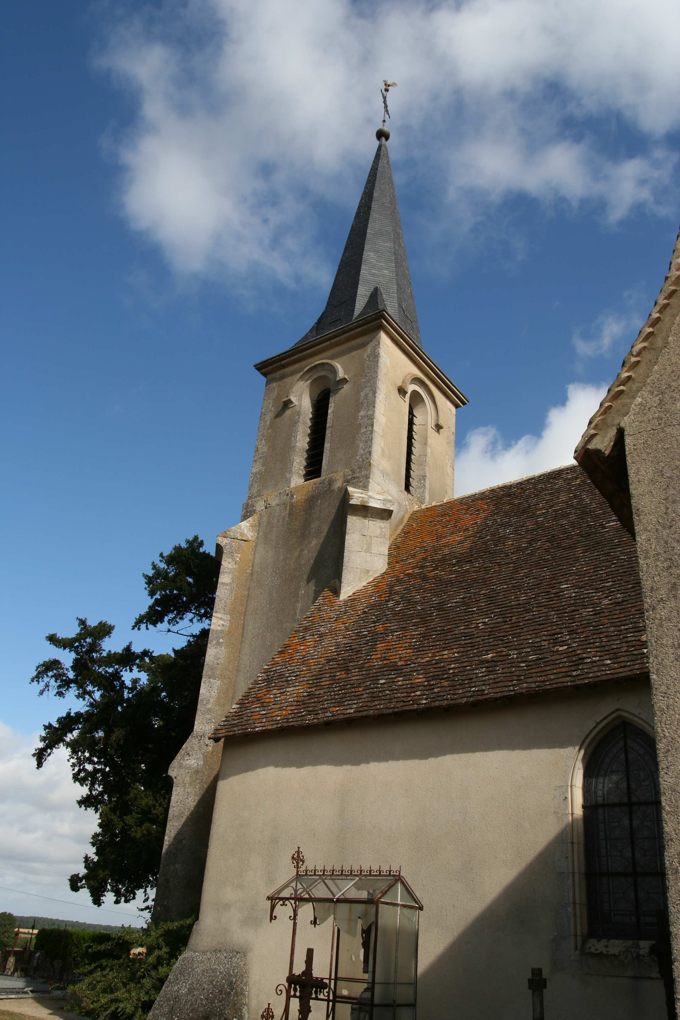 Église Saint-Barthelémy de Jauzé.